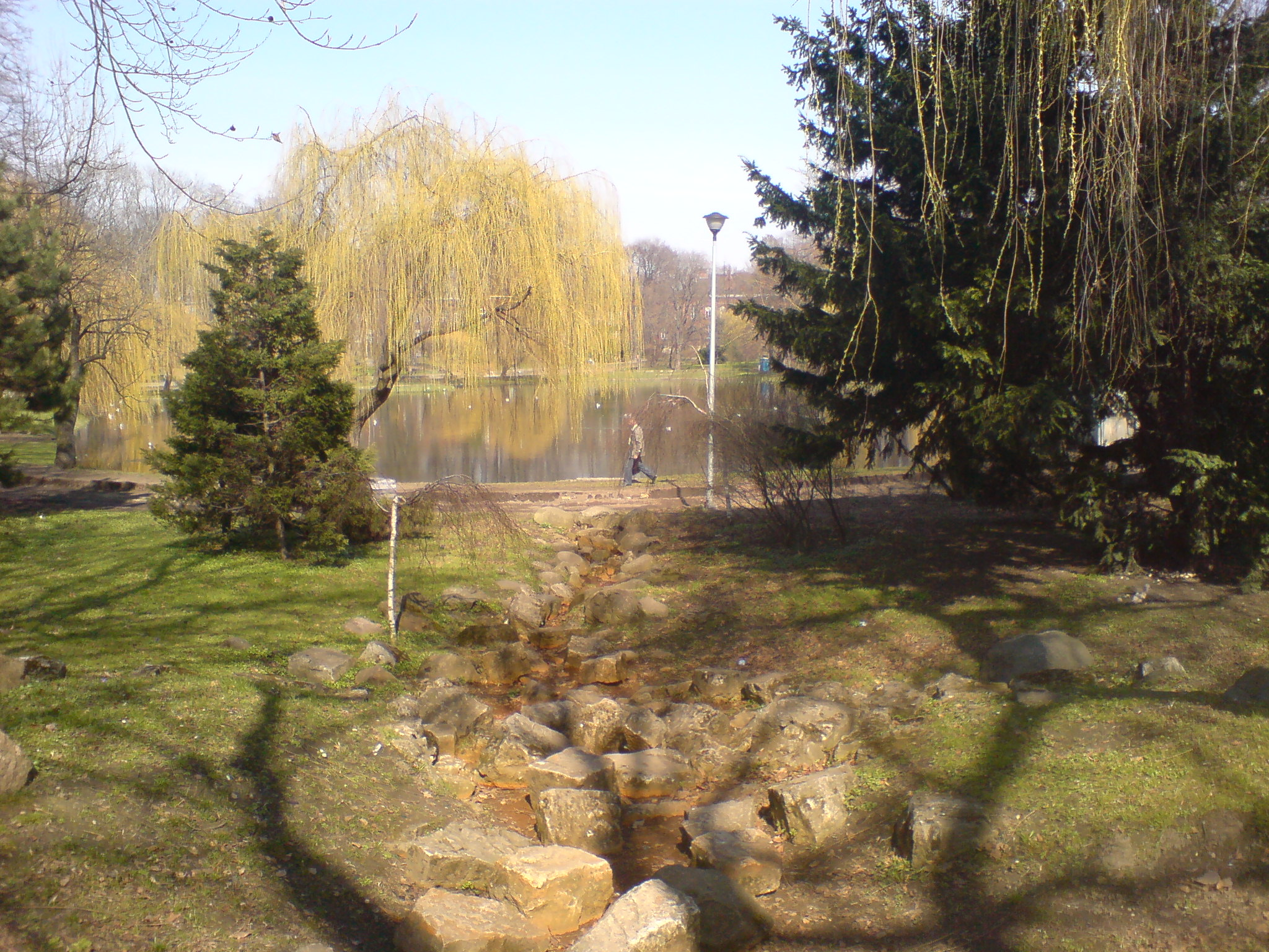 Park im. miasta Roth w Raciborzu